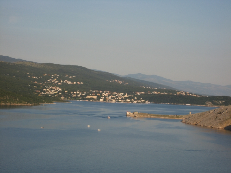 Jadranovo, Croatia